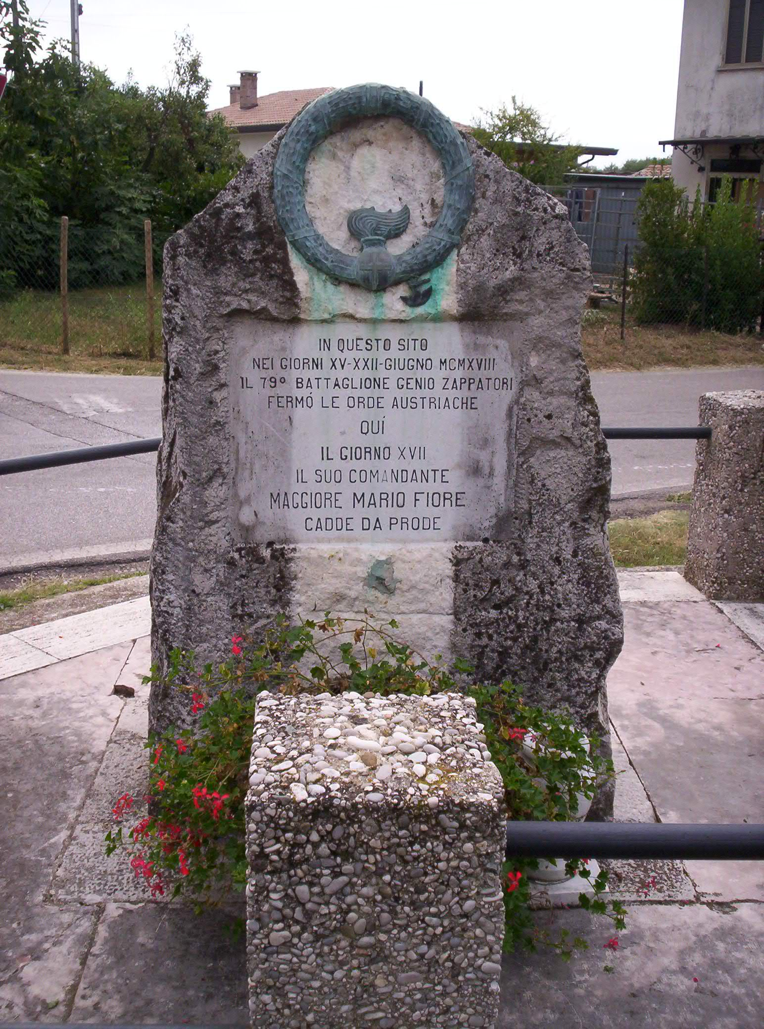 Il monumento dedicato a Mario Fiore a Bavaria.